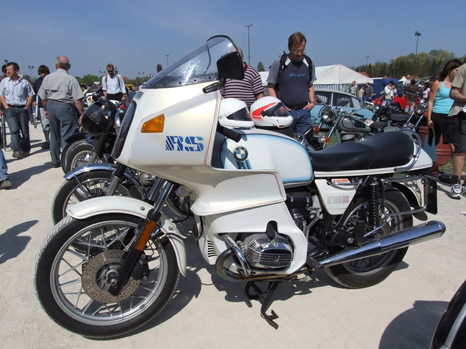 Quelle: selbst fotografiert, 04/2007 Fotograf: Späth Chr.